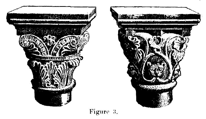 Le Donjon de Courmenant, ses origines, ses seigneurs et possesseurs, son musée